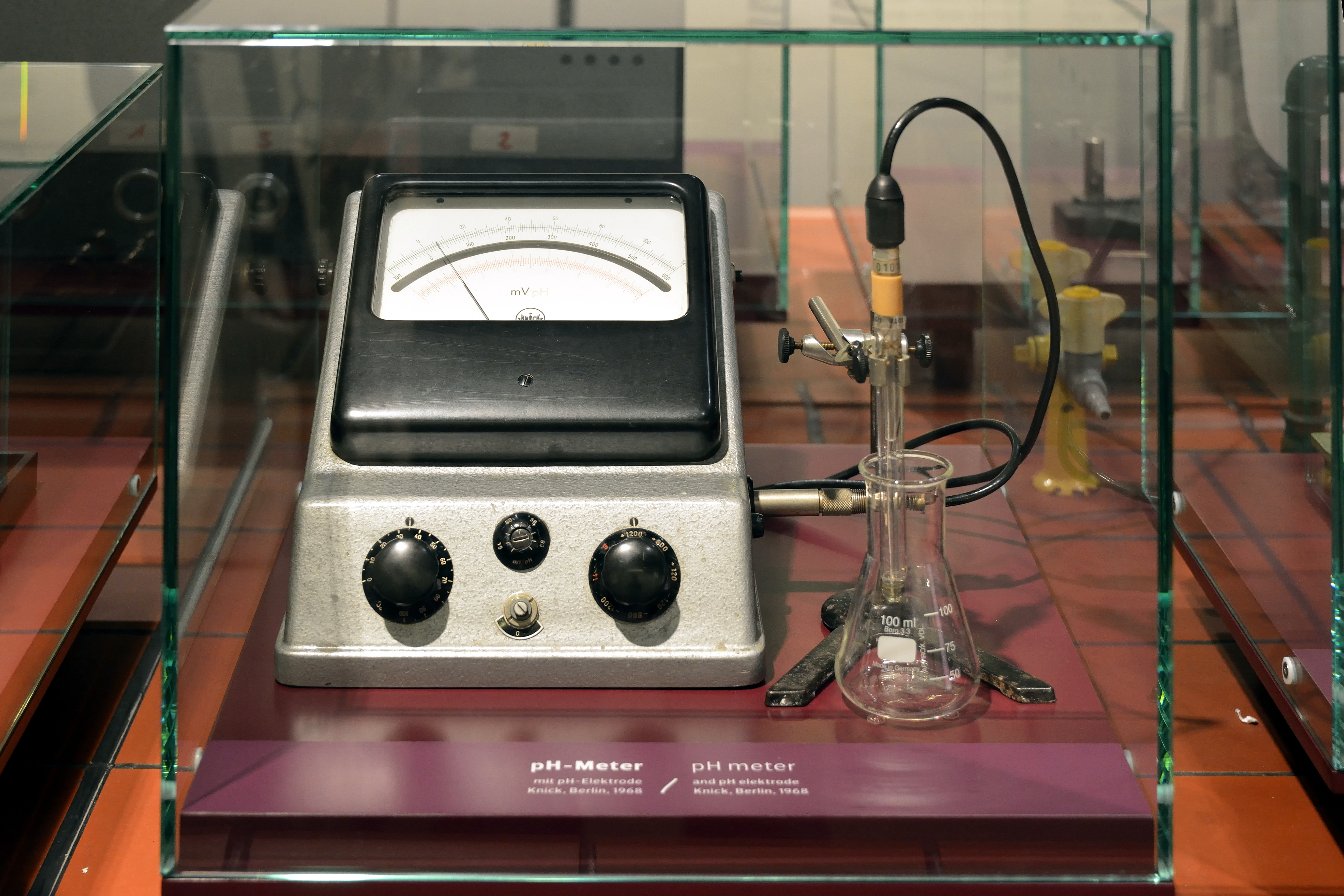 ph-Meter der Firma Knick im Deutschen Technikmuseum Berlin, 1968